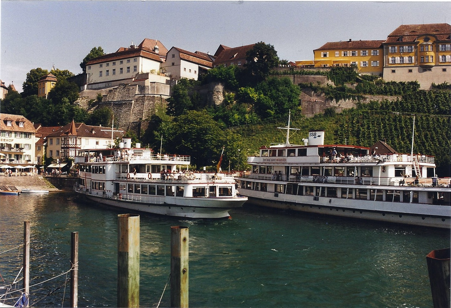 Die Kursschiffe Überlingen (1935) und Schwaben (1937) im Hafen von Meersburg am Bodensee. Darüber das Neue Schloss.